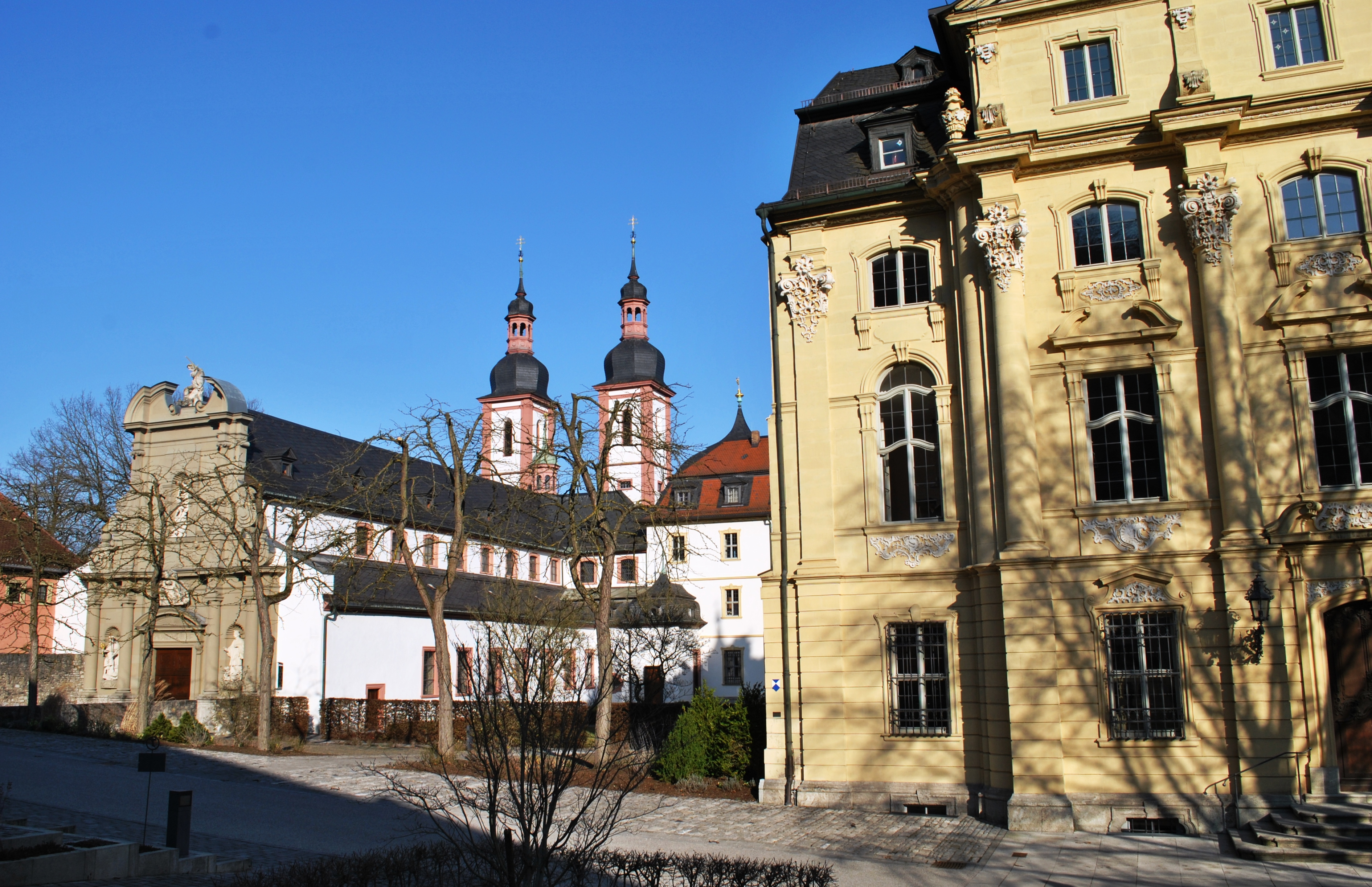 Ehemals Prämonstratenserkloster Oberzell gegründet 1128, zunächst Doppelkloster, ab 1260 Abspaltung des Frauenklosters und Gründung des Klosters Unterzell, 1802 Säkularisation, ab 1817 Schnellpressenfabrik König und Bauer, seit 1901 erneute Klosternutzung unter der Kongregation der Dienerinnen der Hl. Kindheit Jesu Katholische Klosterkirche Sankt Michael, dreischiffige Säulenbasilika mit Ostquerschiff und zwei Chortürmen mit Welschen Hauben sowie Westvorhalle, im Kern 2.Hälfte 12. Jahrhundert, Einwölbung 1. H. 17. Jahrhundert, Fassade im römischen Barock 1696, Chor und Chortürme nach Abbruch (1838) 1901 wiedererrichtet, mit Ausstattung Konvent- bzw. Prälaturgebäude, vierflügelige Anlage um Binnenhof mit verlängertem Ostflügel (ursprünglich als Doppelhofanlage geplant), in Form von dreigeschossigen Flügeln mit Mansarddächern, West- und Südflügel mit Eck- und Mittelrisaliten sowie Pavillondächern, von Balthasar und Franz Ignaz Michael Neumann, 1744-60